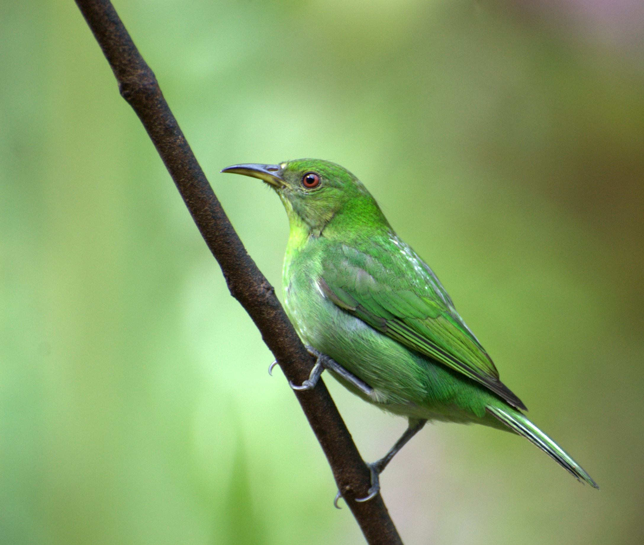 Folha Seca - Ubatuba-SP - Brasil